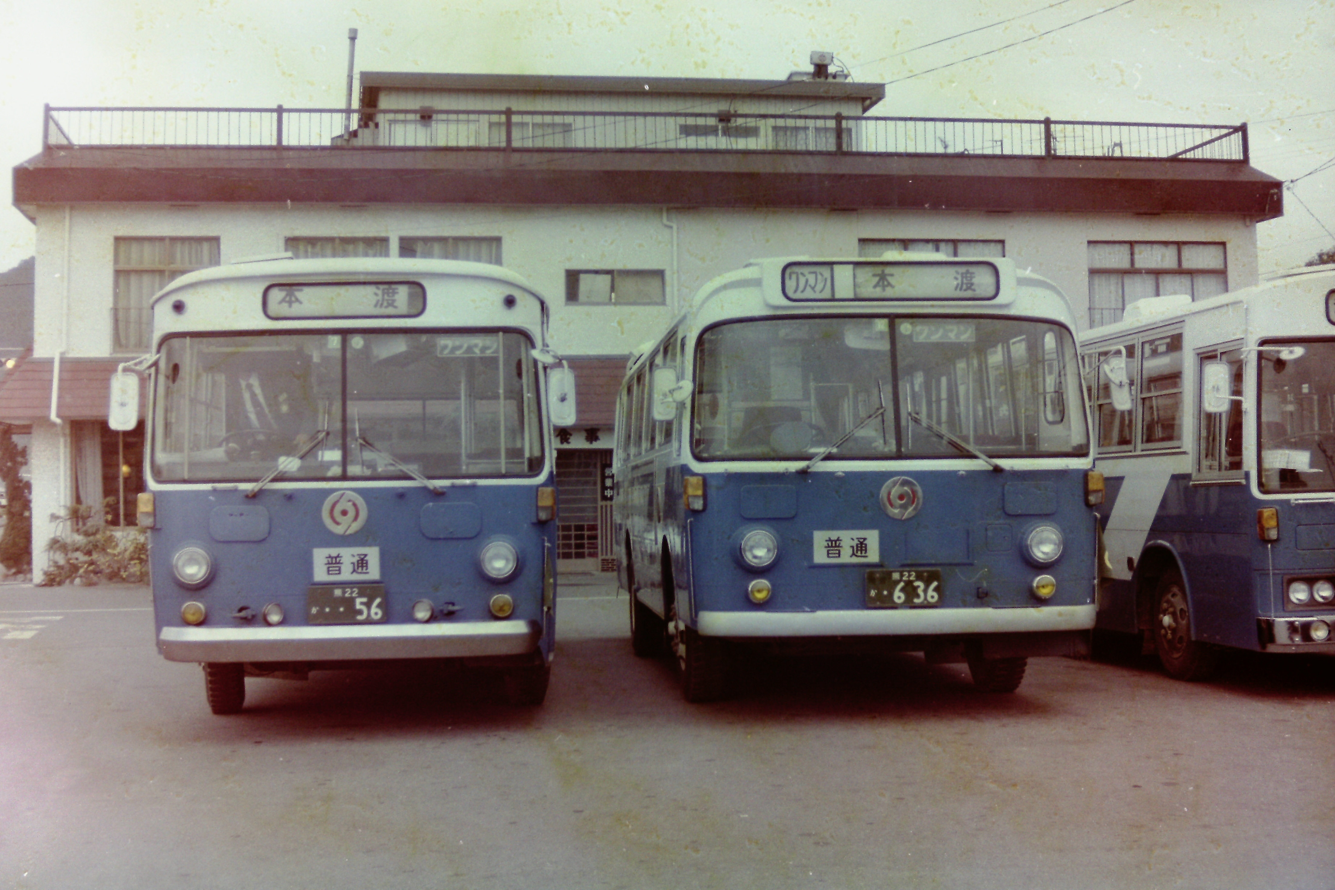 旧松島案内所に待機中の車両